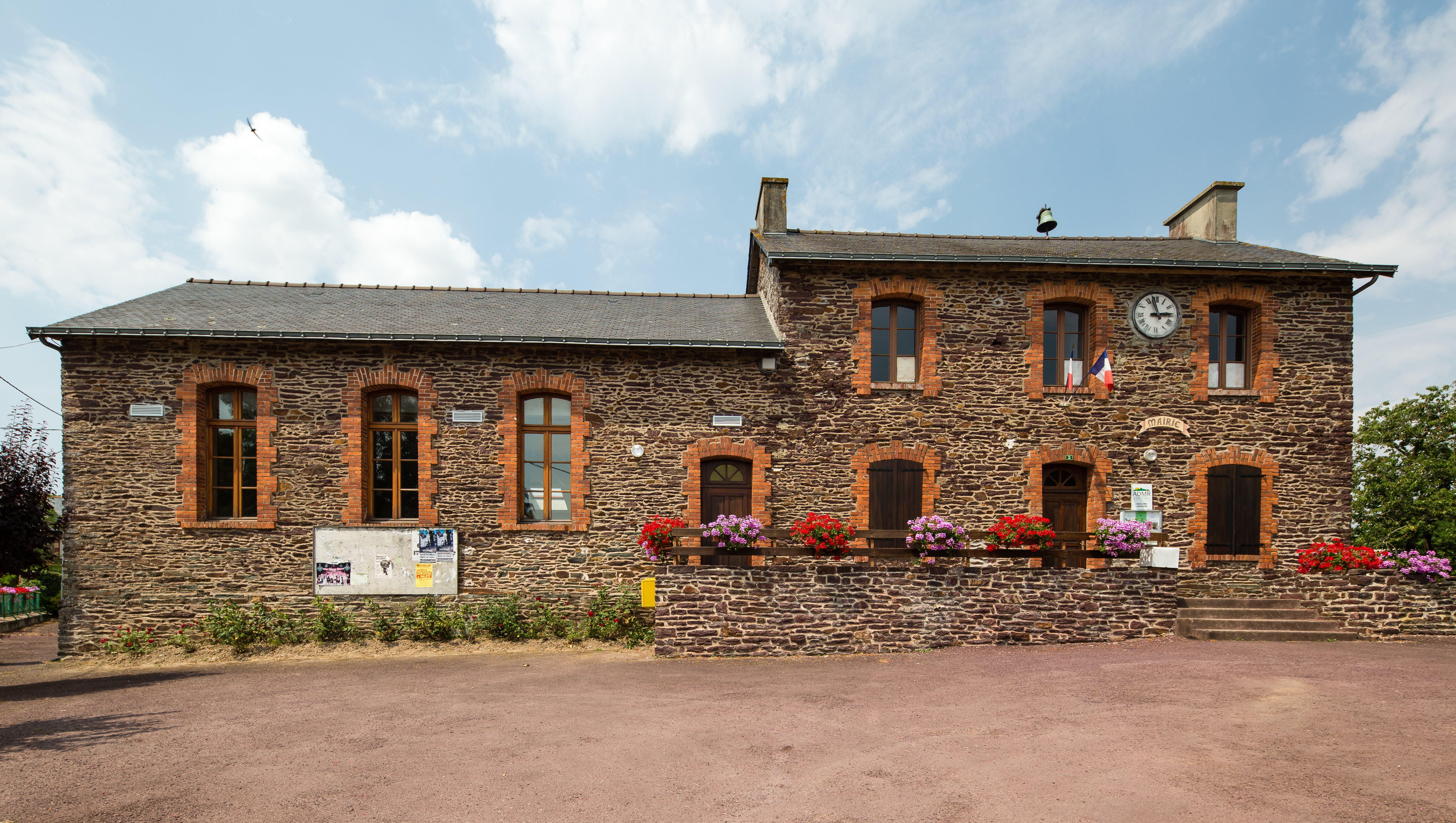 Mairie de Tréhorenteuc (France).